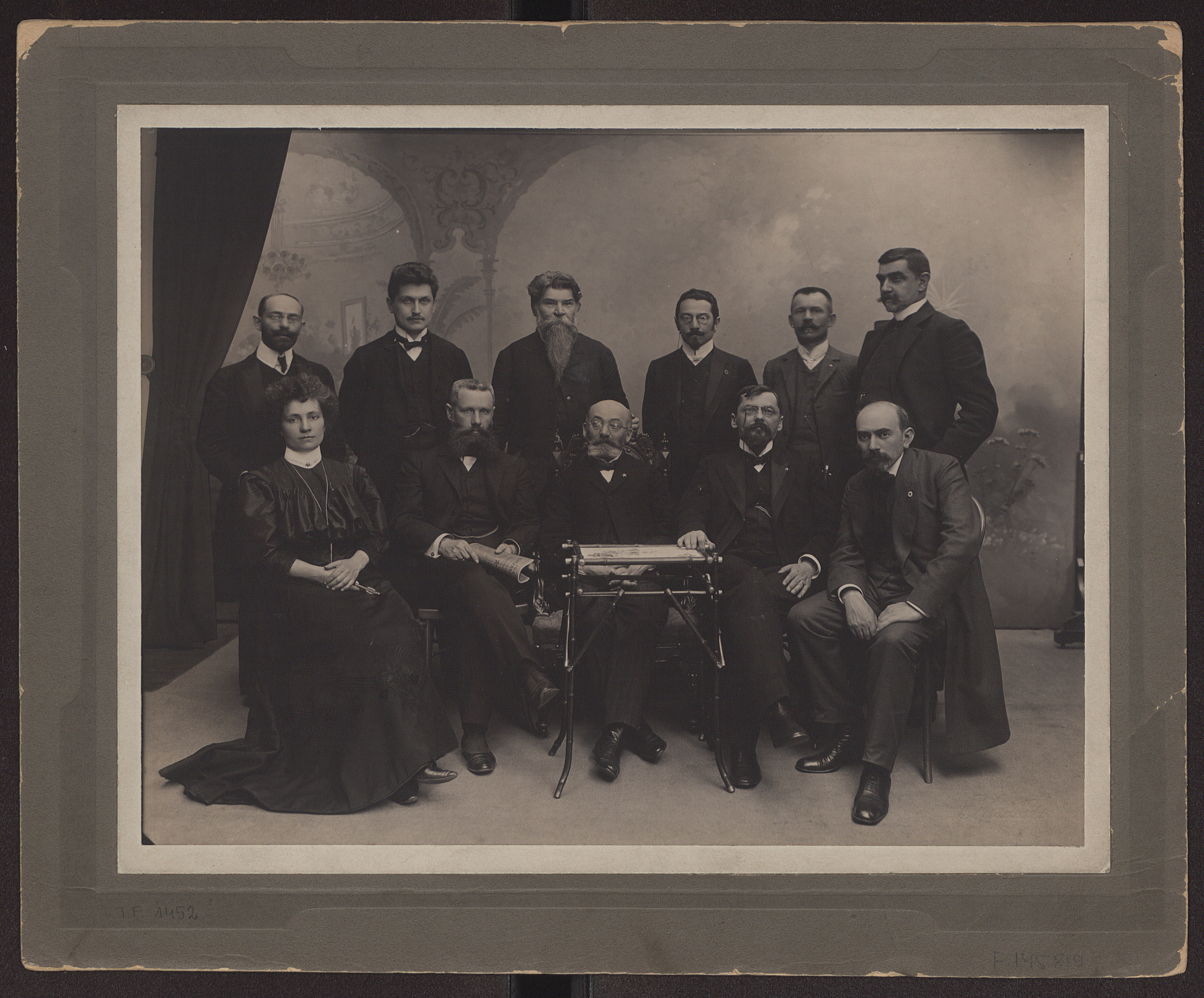 Grupa esperantystów. Stojący od lewej: Leon Zamenhof, Kazimierz Bein (Kabe), Aleksander Bolesław Brzostowski, nieznany, nieznany, Adam Zakrzewski. Siedzą, od lewej: nieznana, Jan Günther, Ludwik Zamenhof, Antoni Grabowski, Leo Belmont.